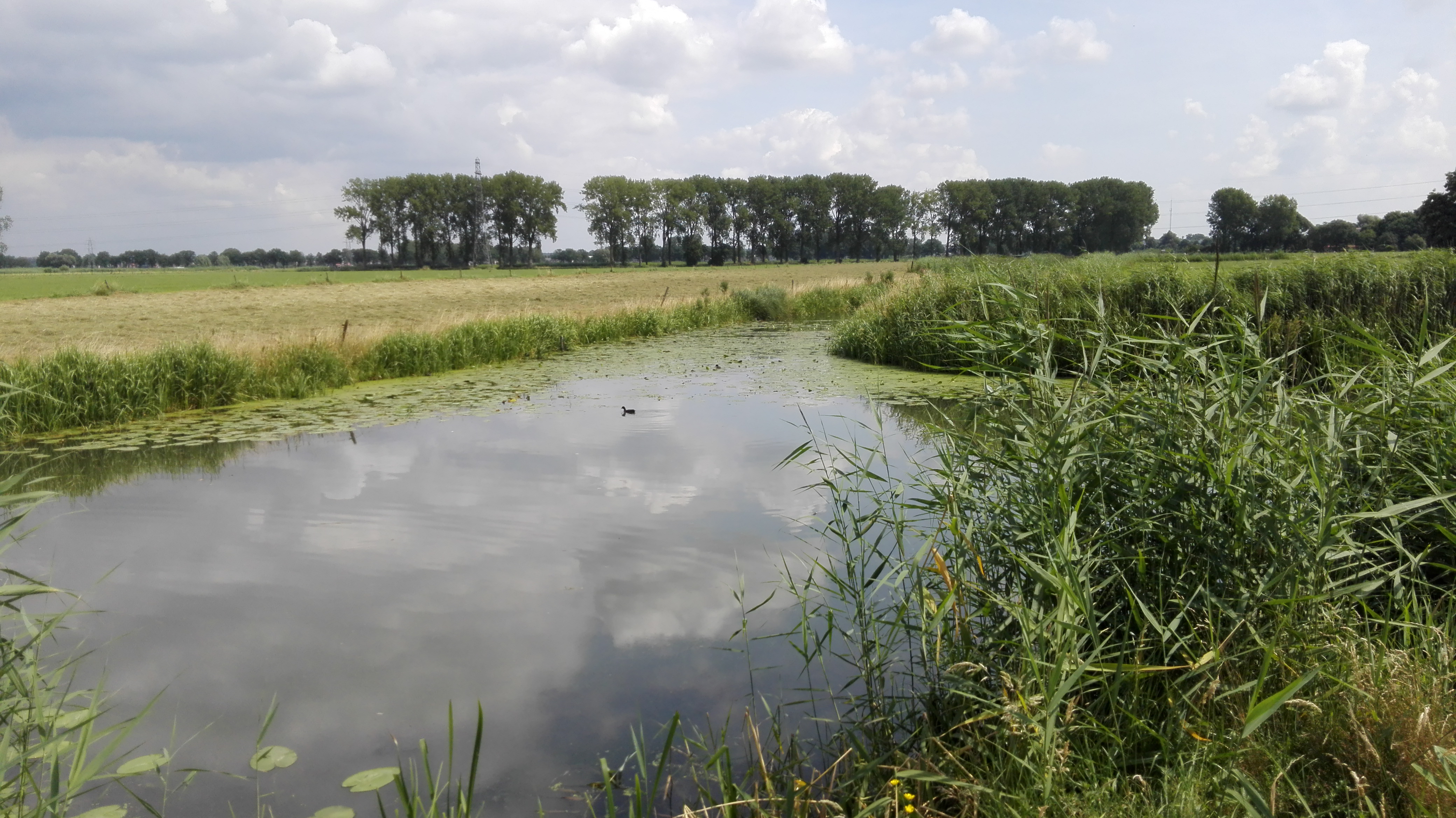 Langs het Valleikanaal in het Binnenveld tussen Wageningen en Achterberg, bij de aansluiting van het Nieuwe Kanaal. Gezien richting het oosten. De bomen op de achtergrond staan aan de Veensteeg.